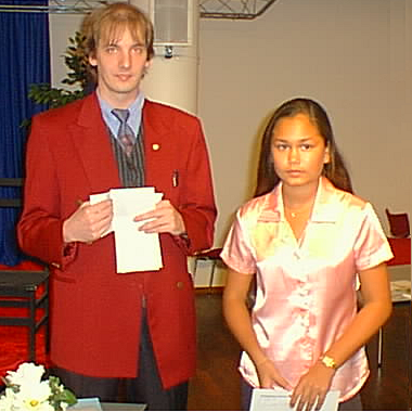 Christian Goldschmidt (Turnierleitung) und Arianne Caoili (14 Jahre, beste Dame Open A), Dortmunder Schachtage 2001.